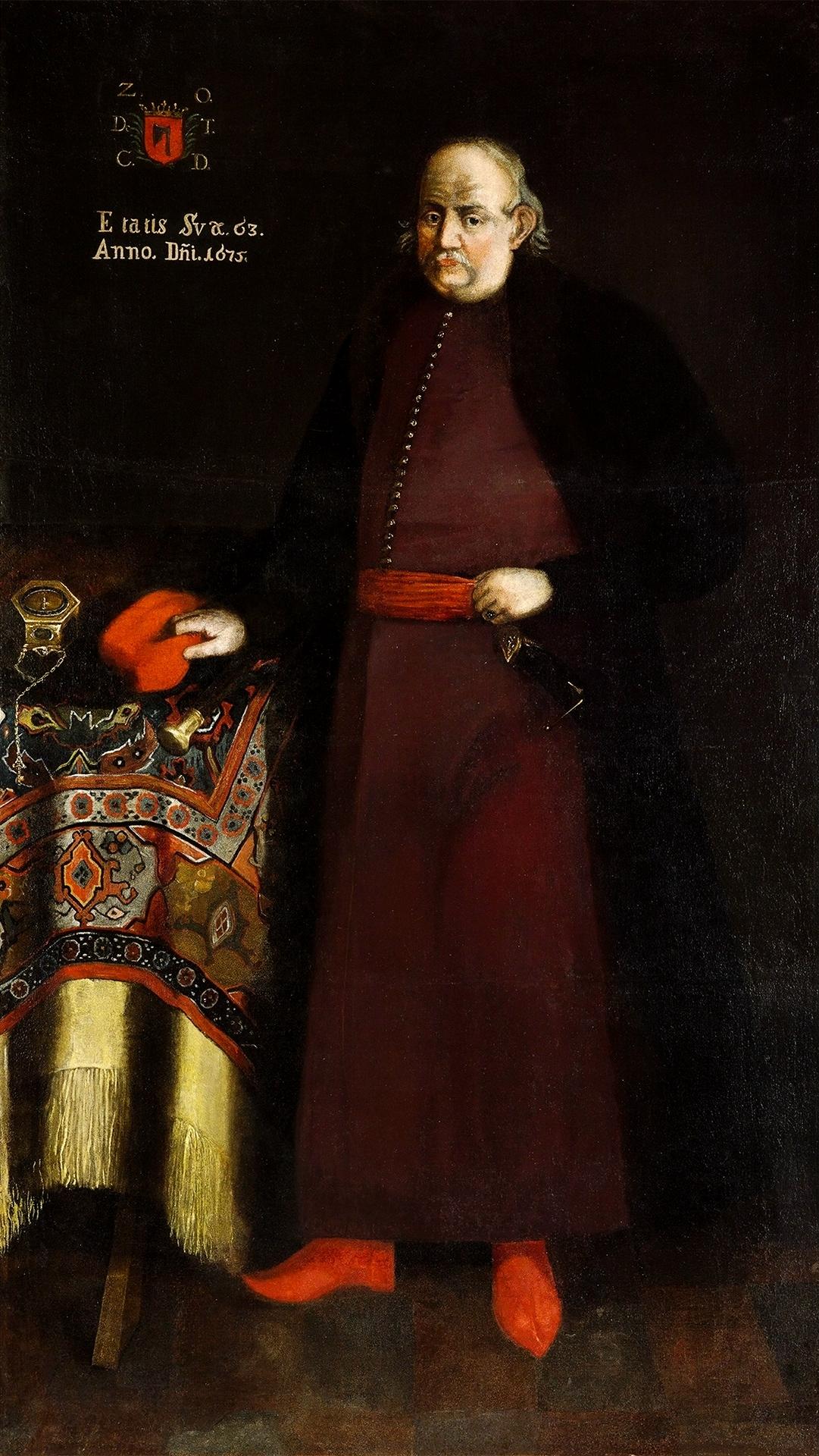 XVII